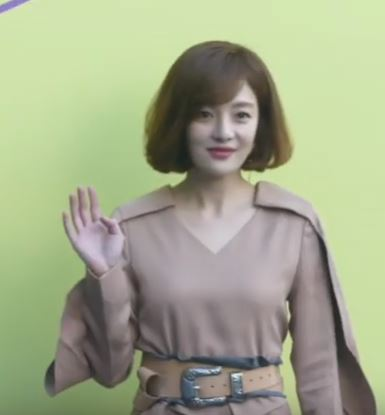 16일 오전 서울시 중구 동대문디자인플라자(DDP)에서 '2020 S/S 서울패션위크(SEOUL FASHION WEEK S/S 2020)' 까이에(CAHIERS) 김아영 디자이너의 컬렉션이 열려 황보라X박시은이 참석해 포토타임을 갖고 있다.